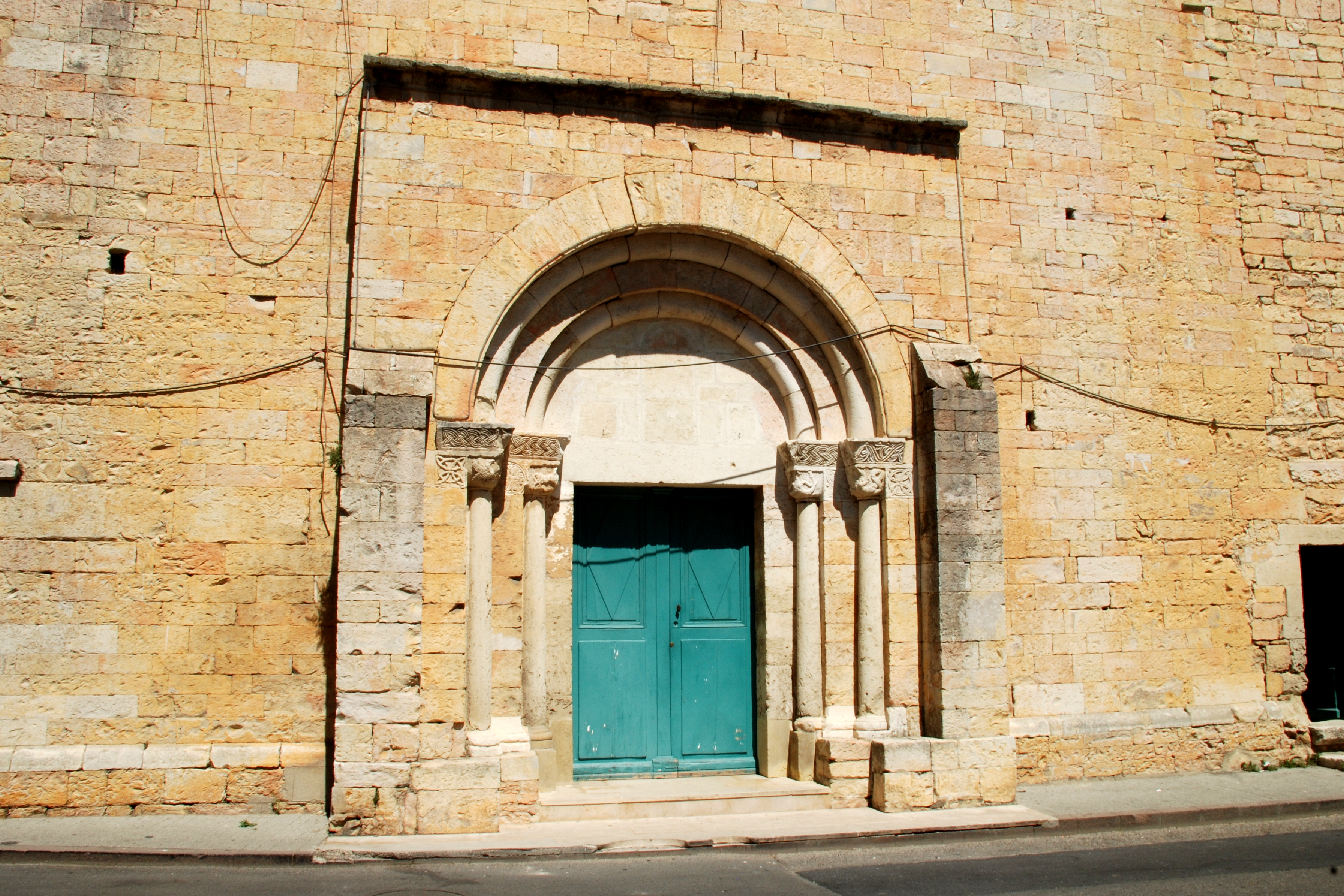 France - Gard - Église Saint-André de Bernis